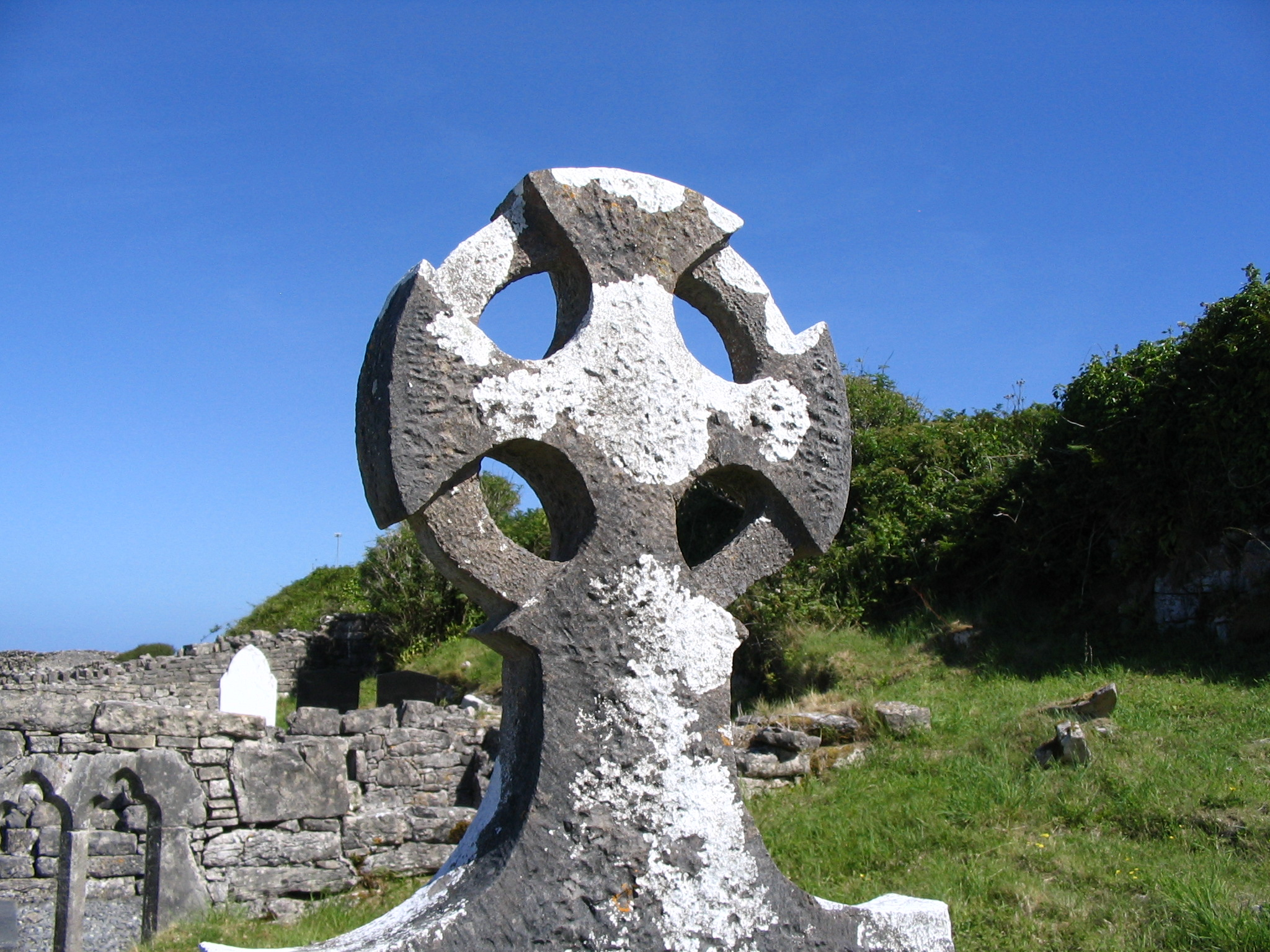 Na Seacht dTeampaill Inis Mor - Seven Churches - Celtic cross